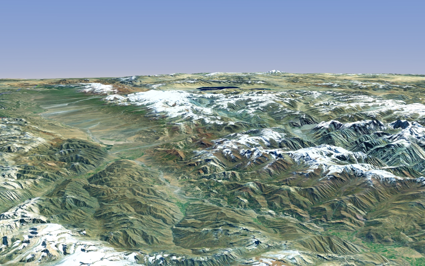 Le chaînon Trans-Alaï, dans le Pamir, vu de l'ouest.